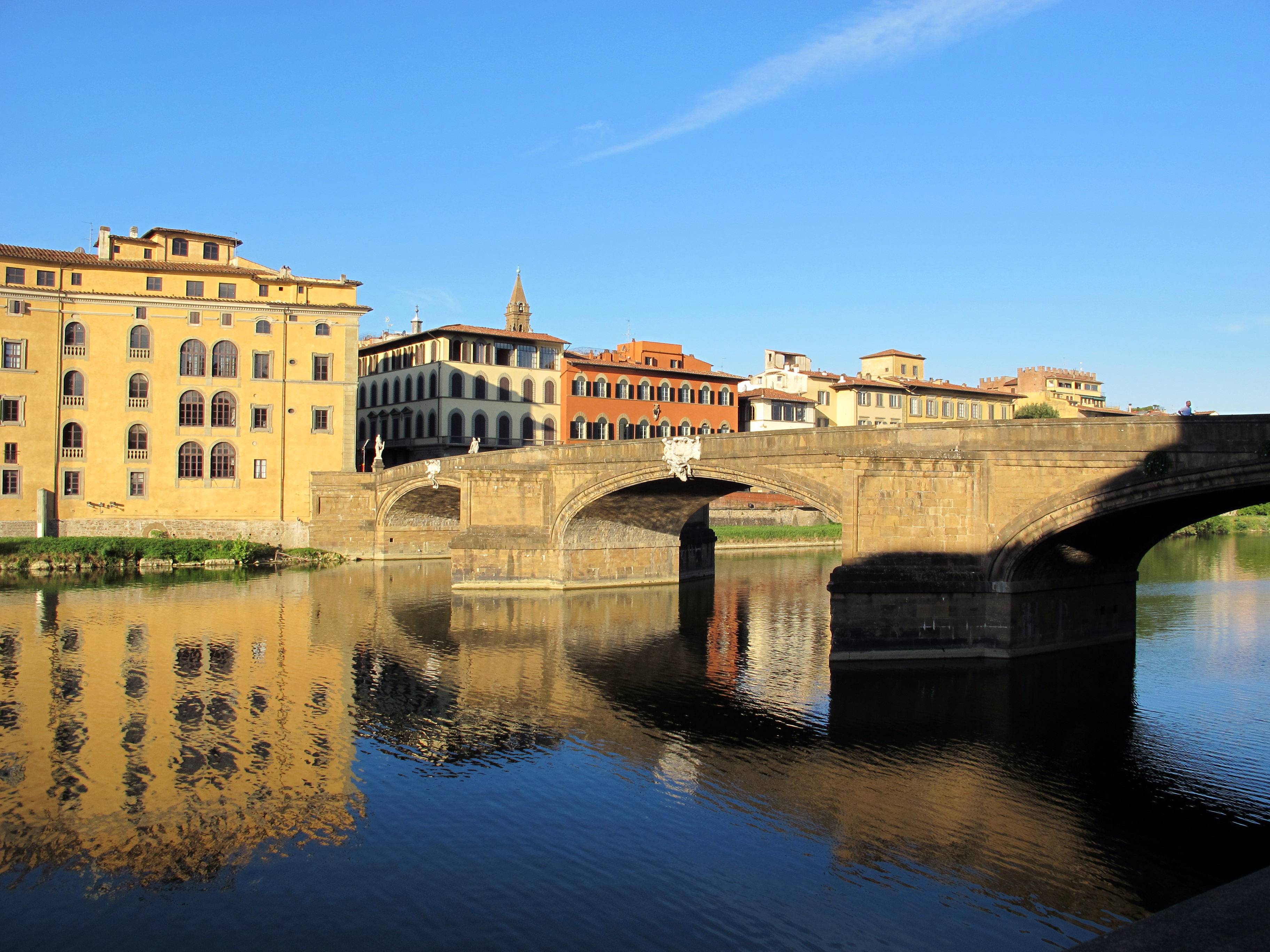 Borgo San Jacopo, Firenze